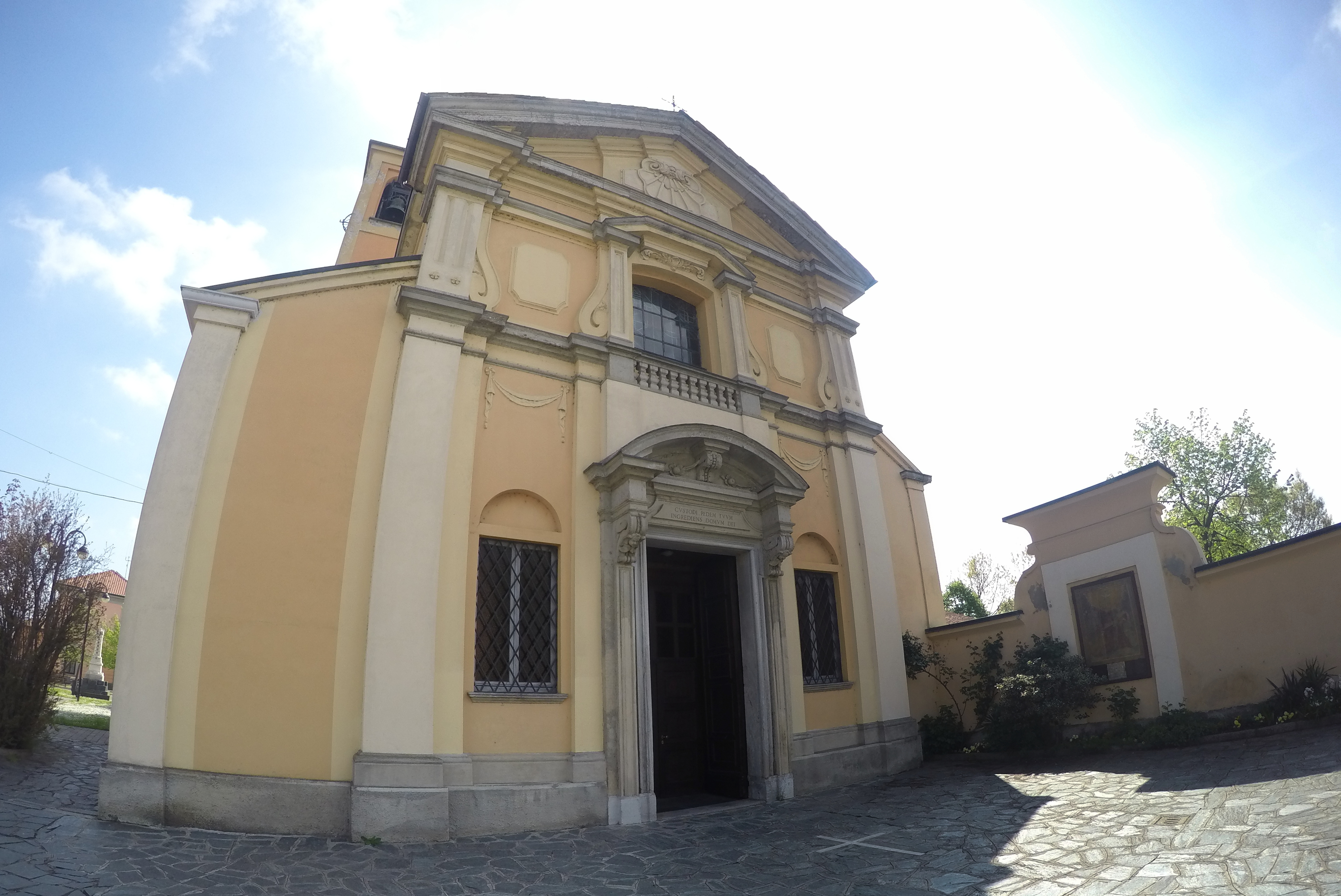 SANTI QUIRICO E GIULITTA P.zza V.Veneto, 1, Gudo Visconti